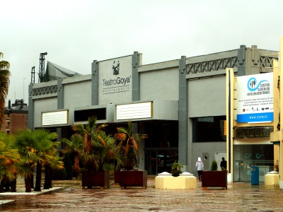 El Teatro Goya en el barrio de Los Cármenes, Madrid.